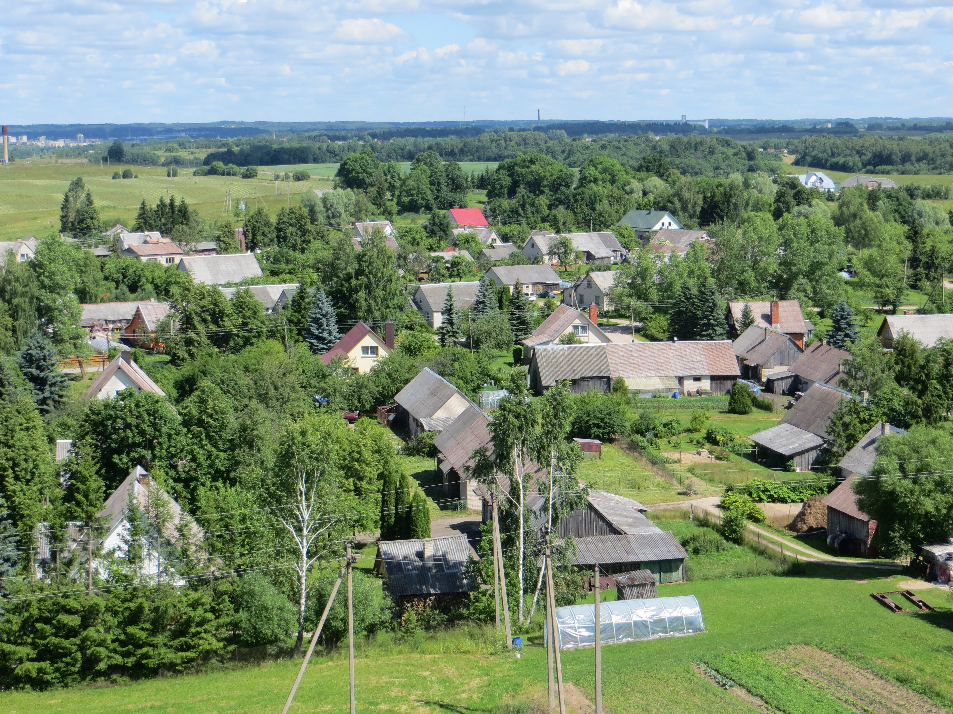 Pačkėnai 28125, Lithuania